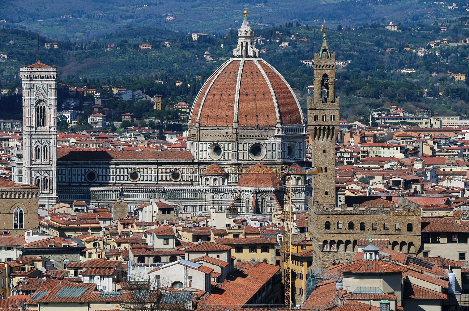 Duomo Firenze veduta dal Forte Belvedere